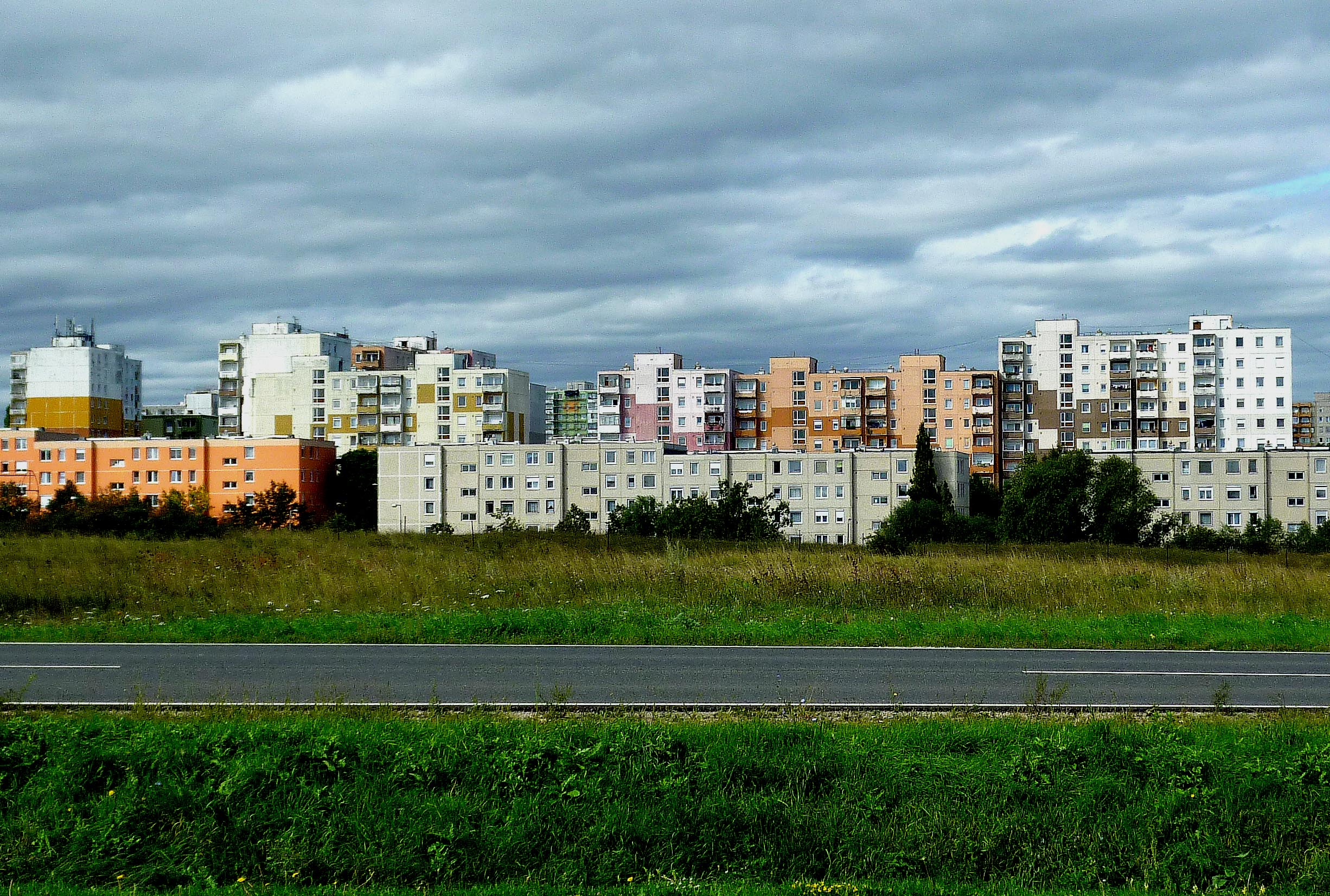 Veszprém, Jutas lakótelep: Utólagos látványjavítás épületszínezéssel, épült 1986-ban